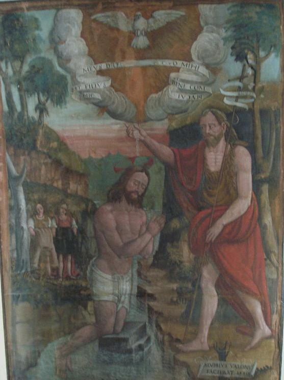 Battesimo di Cristo - Albosaggia, Oratorio di San Ciriaco - Foto Romeri M.